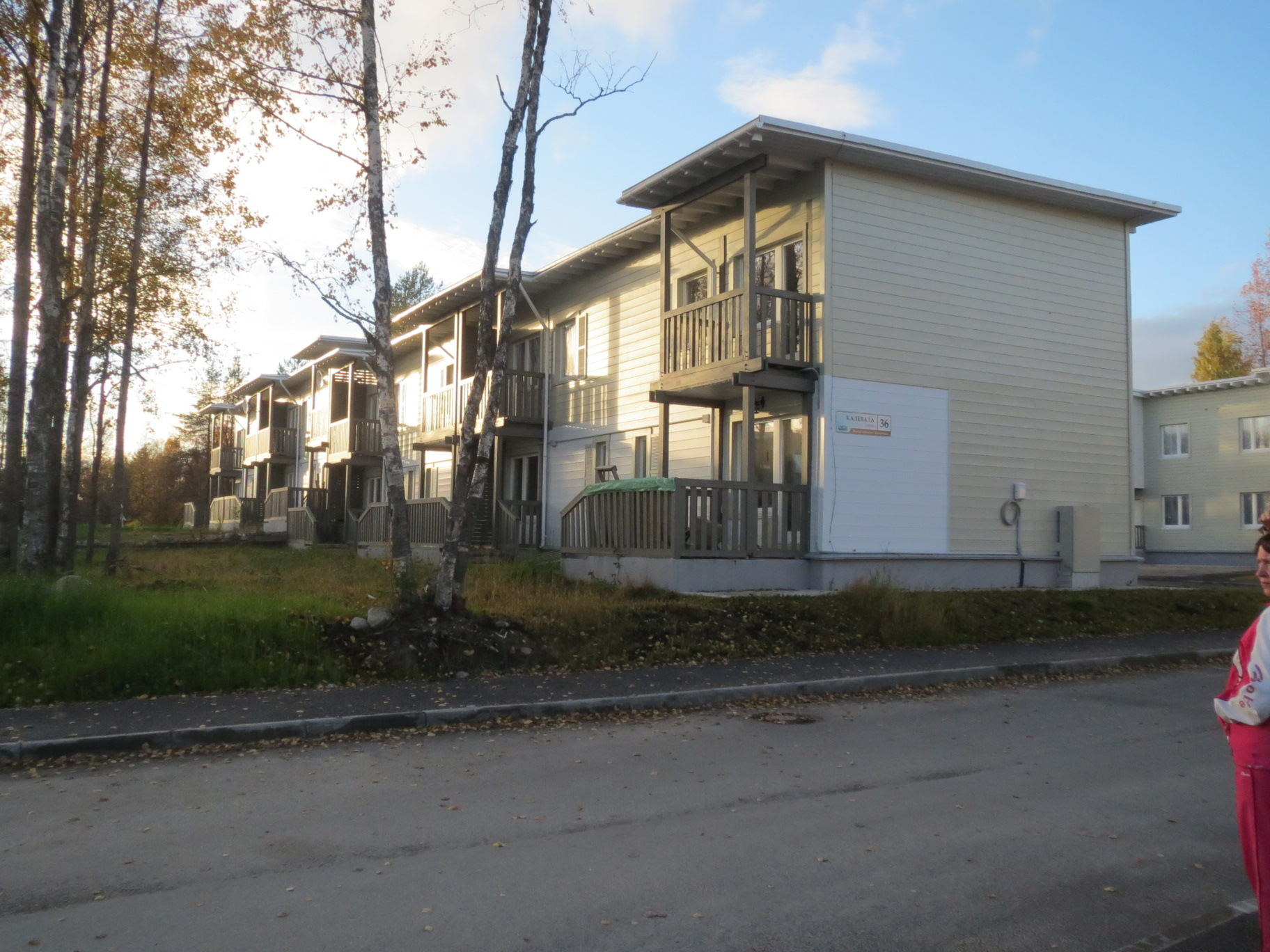 Kontuvaara on Kostamuksen uutta kaupunginosaa